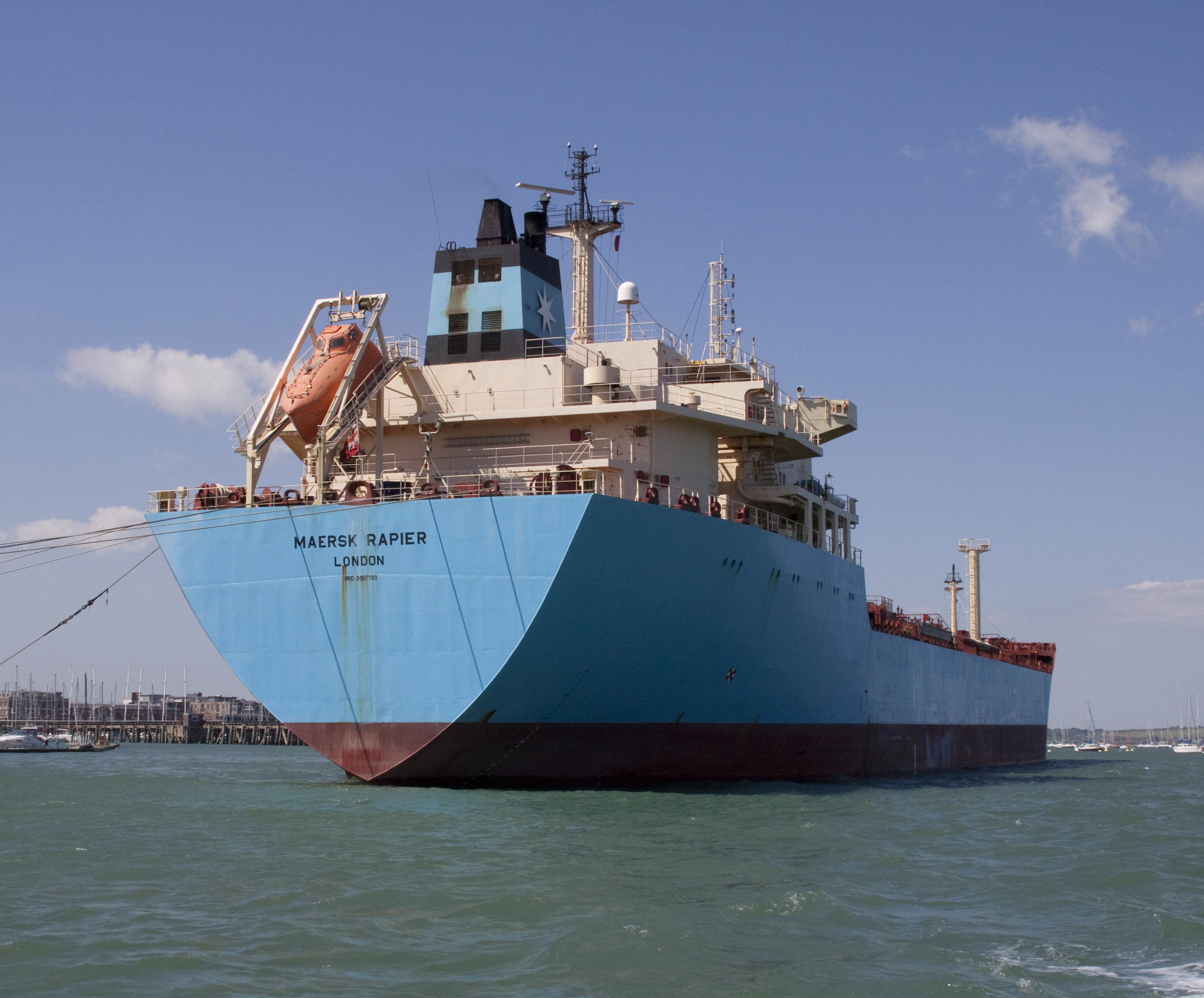 Maersk Rapier